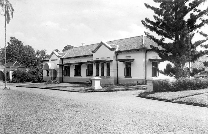 Repronegatief. Het Treub-Laboratorium in 's Lands Plantentuin te Buitenzorg, West-Java